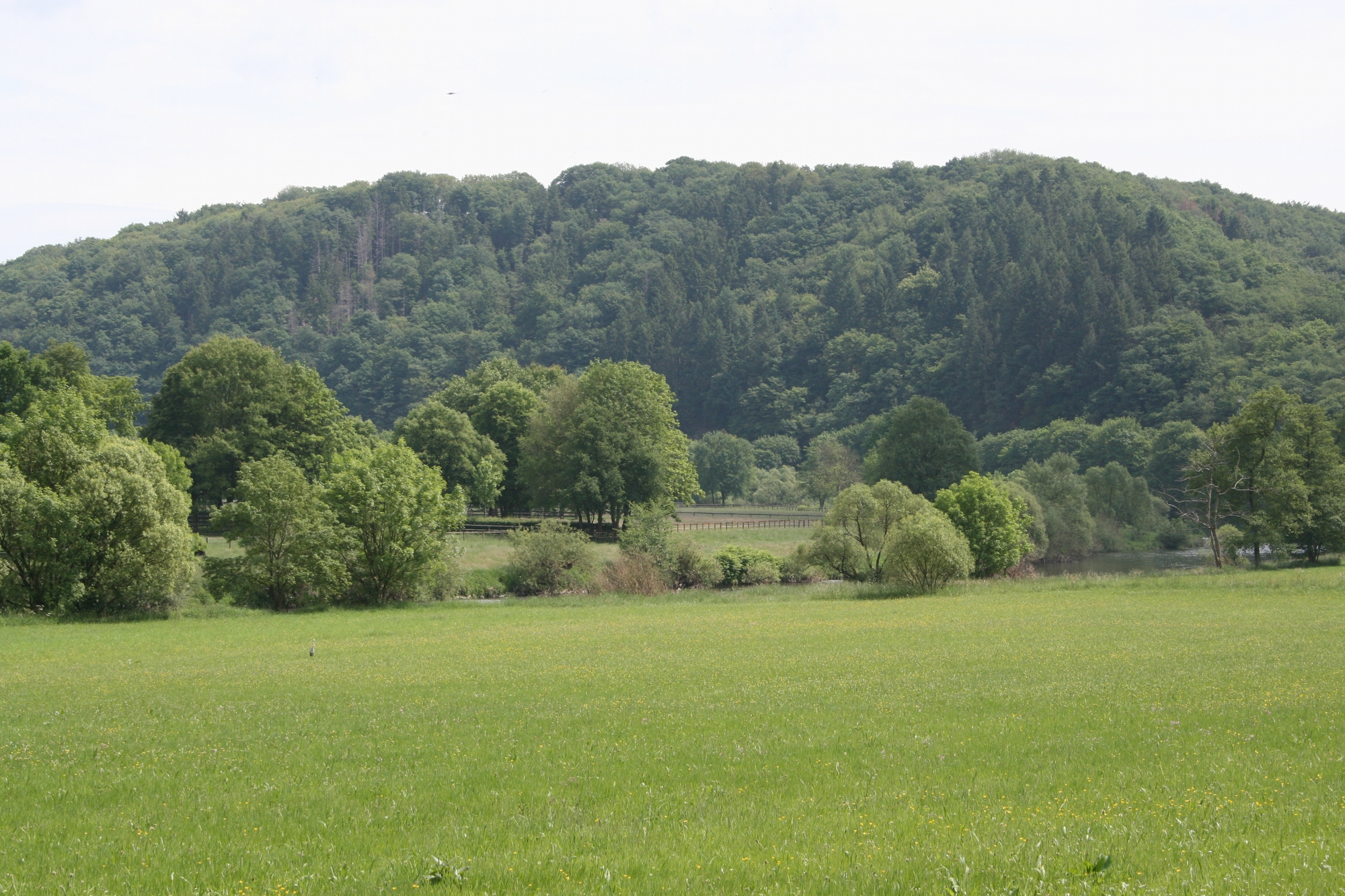 Eitorf-Bach